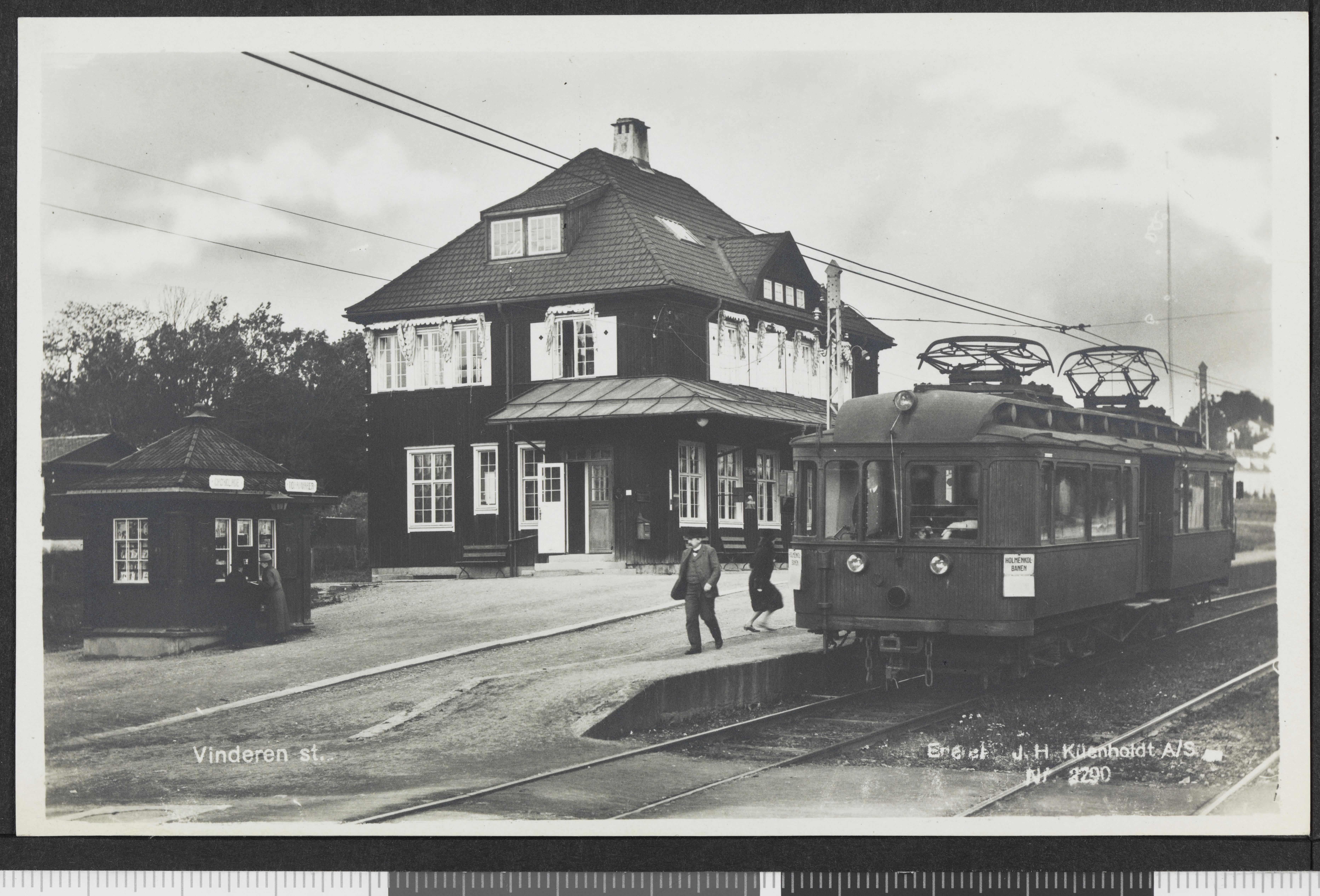 Bildet er hentet fra Nasjonalbibliotekets bildesamling Vinderen,Vinderen stasjon, Oslo, Oslo